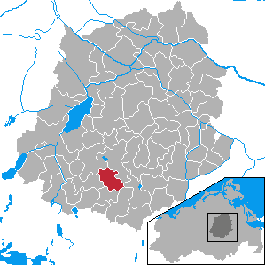 Ritzerow, Landkreis Demmin, Mecklenburg-Vorpommern